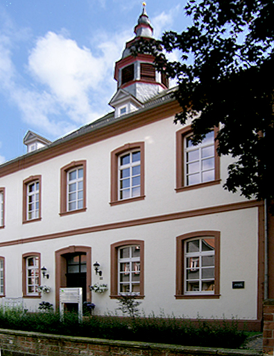 Altes Amtsgericht in Buedingen (Hessen), Lutherische Kirche, Schlossstraße